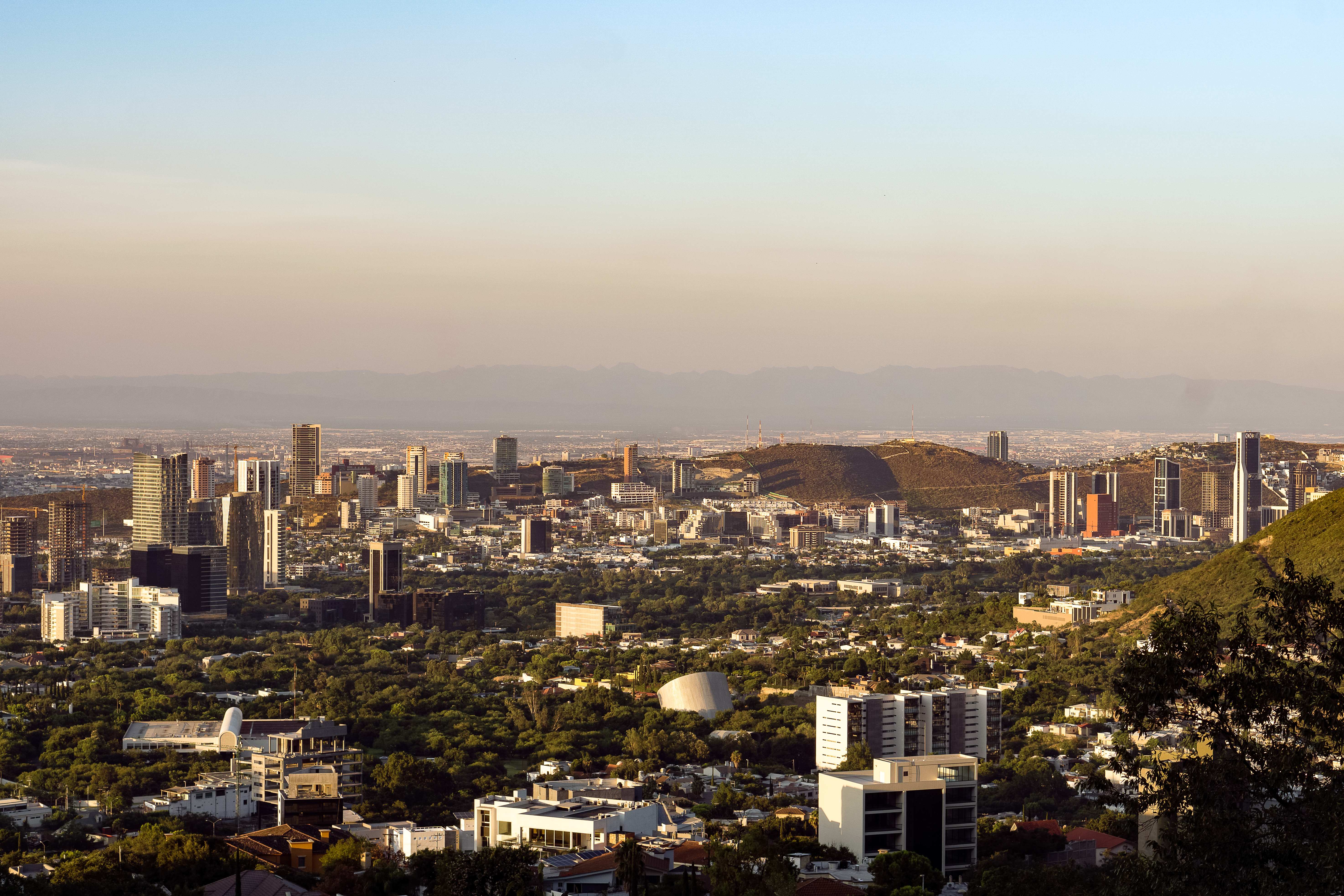 Panorama de San Pedro Garza Garcia